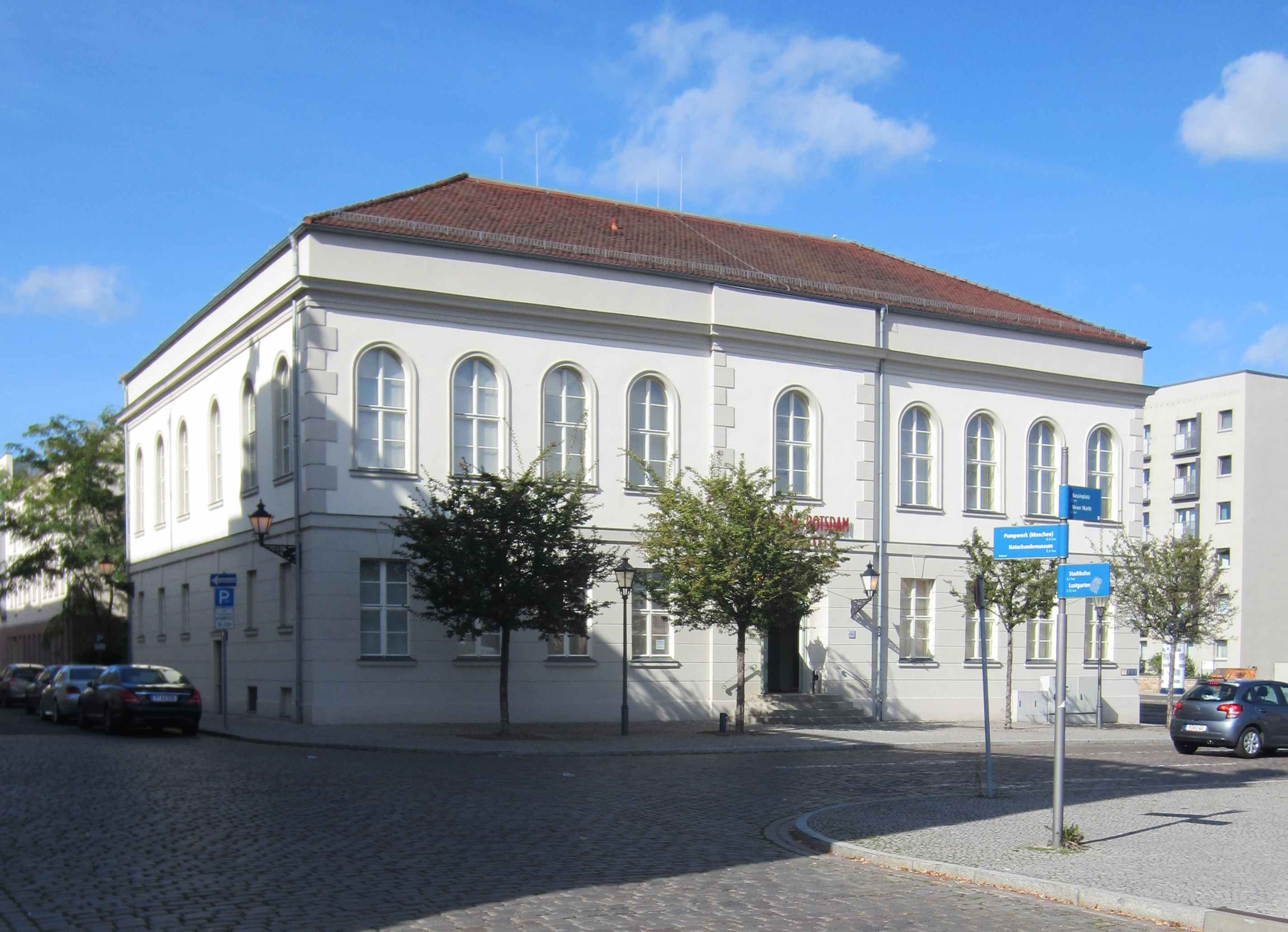 Bürgerhaus in Potsdam, Schlossstraße 14